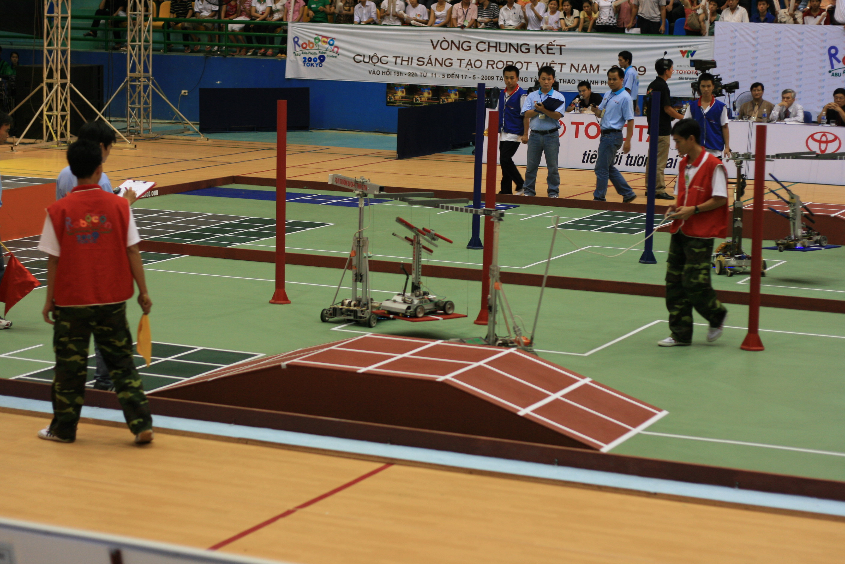 Một cảnh thi đấu trong khuôn khổ giải Robocon Việt Nam 2009 tại Huế